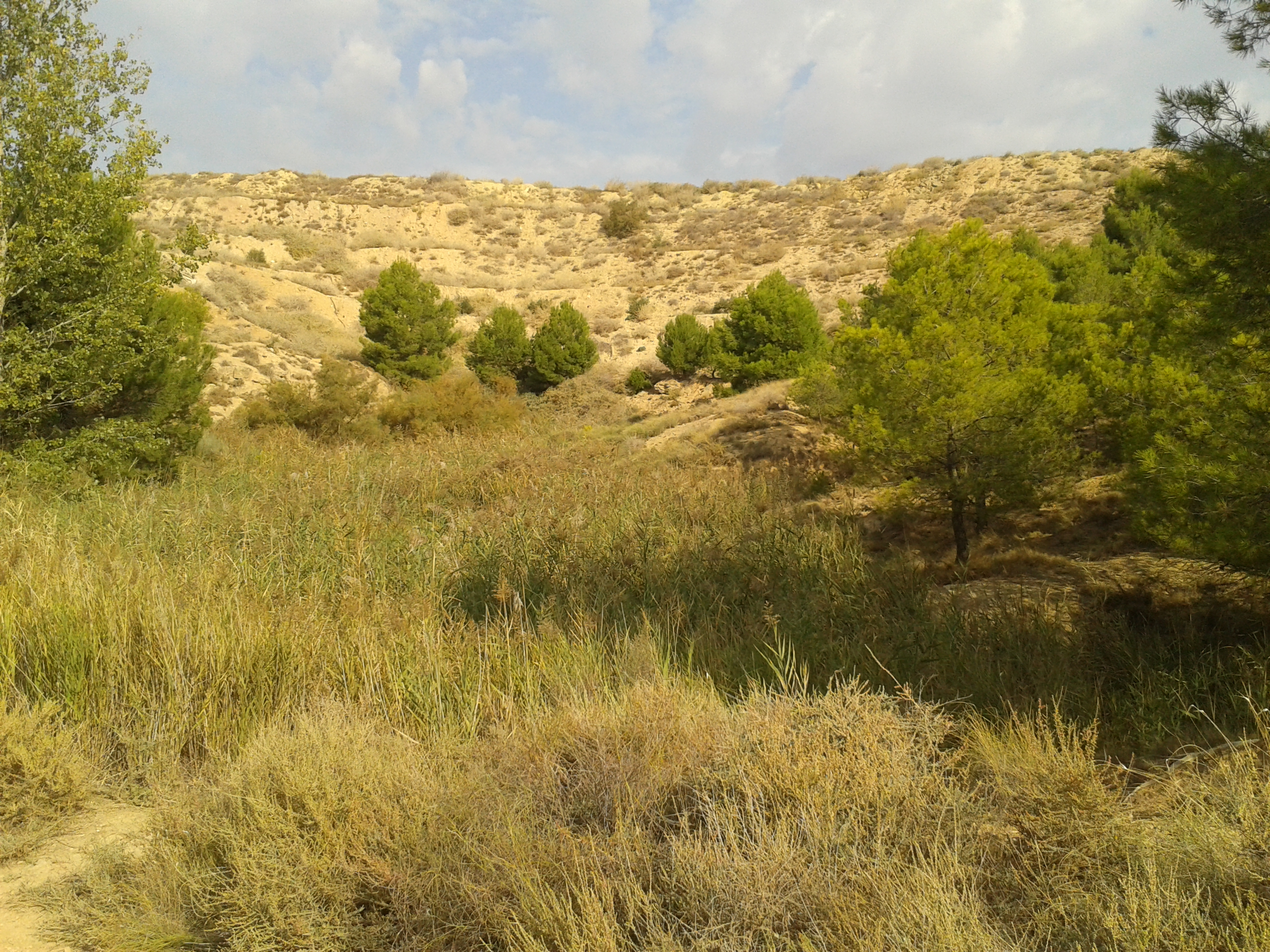 Punt de neixament del riu Noguerola a Alpicat (el Segrià)